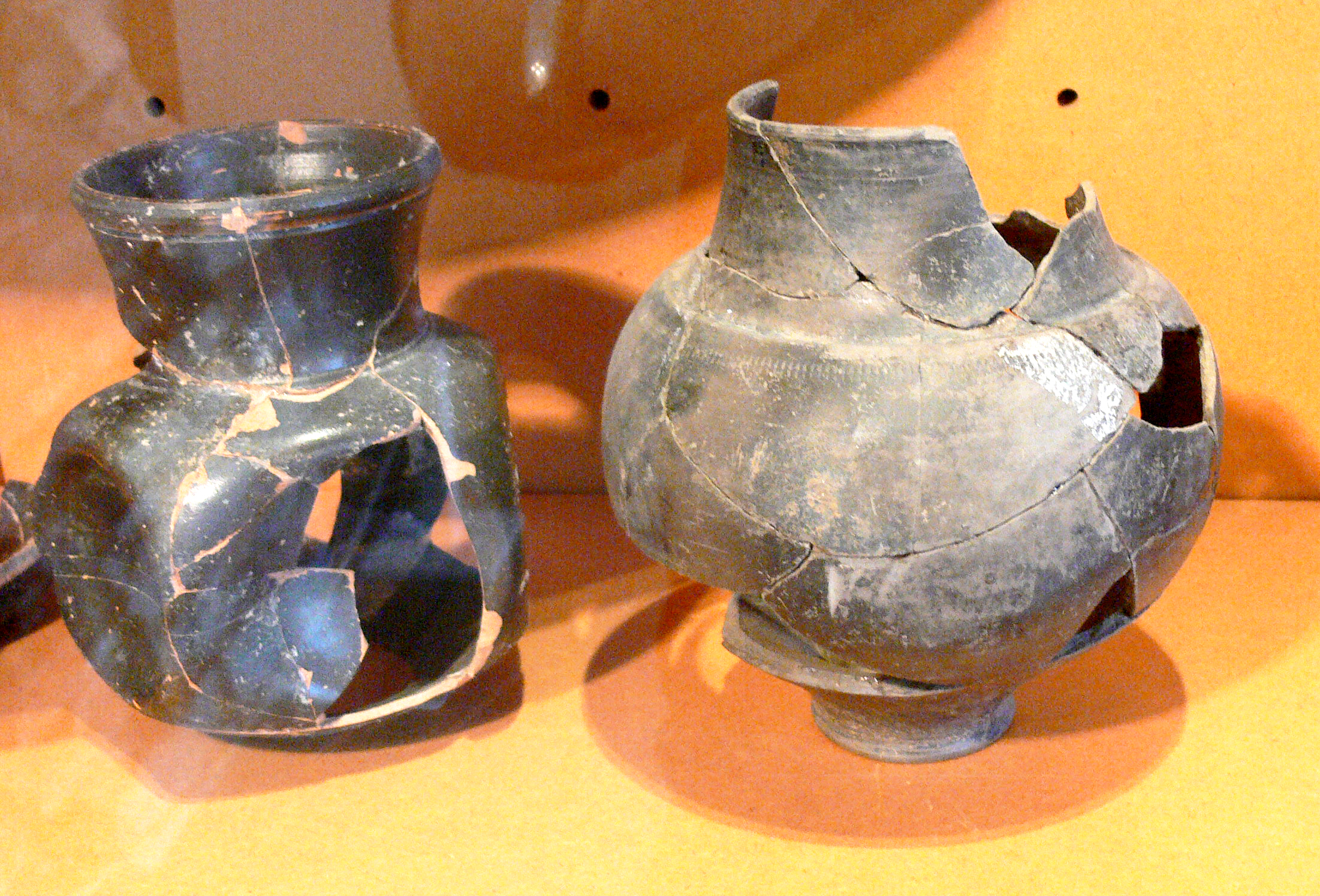 Céramique trouvée dans les fouilles de l'établissement gallo-romain de Chassey-lès-Montbozon. Vesoul, musée Georges-Garret